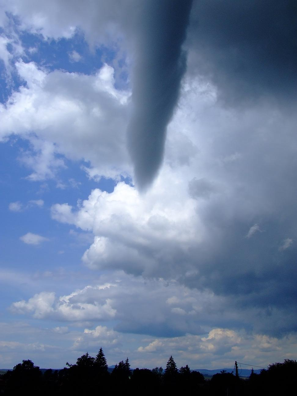 Tuba Ipolytarnóc felett 2008. augusztus 24-én